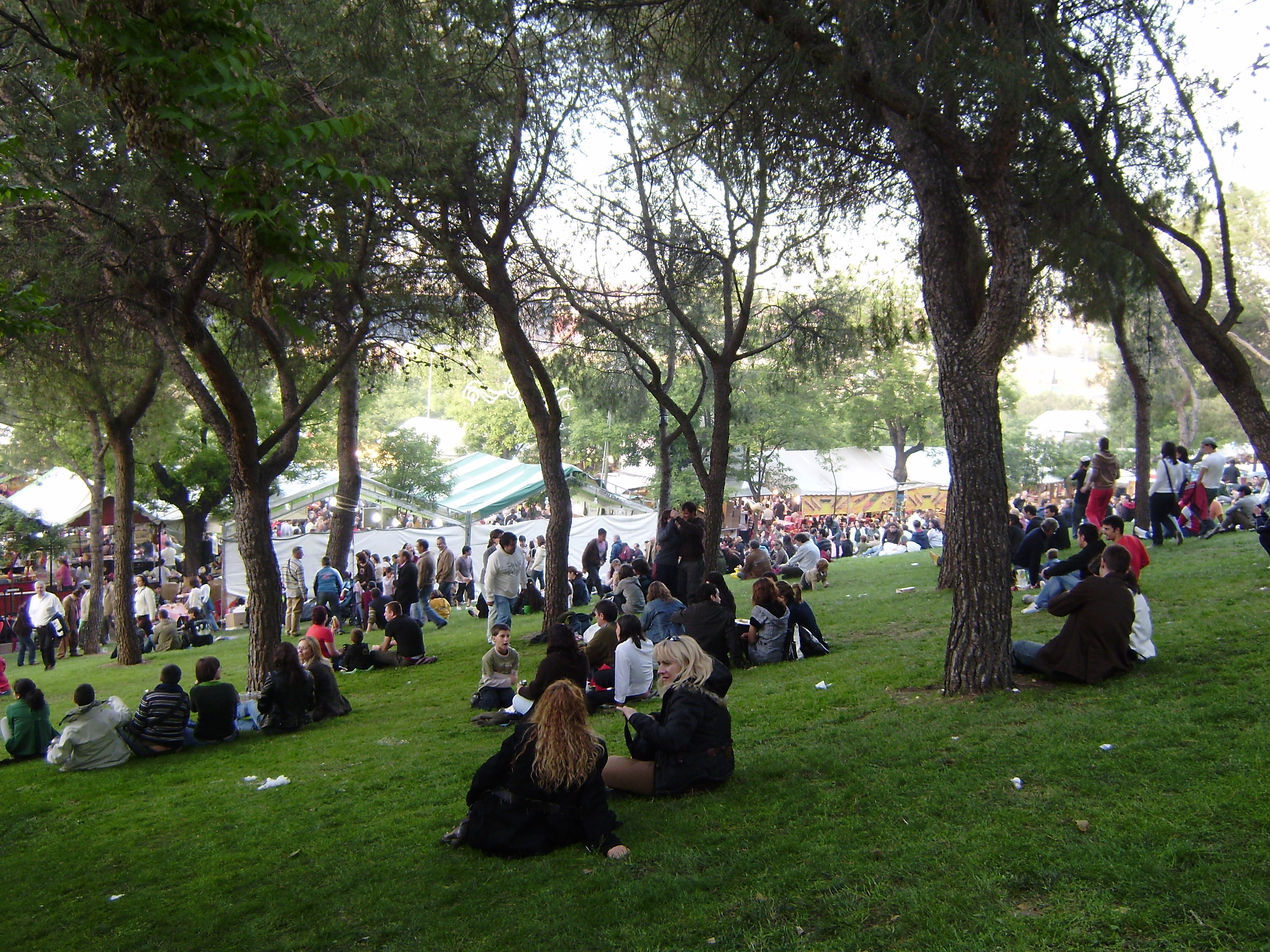 Madrileños en el Parque de San Isidro